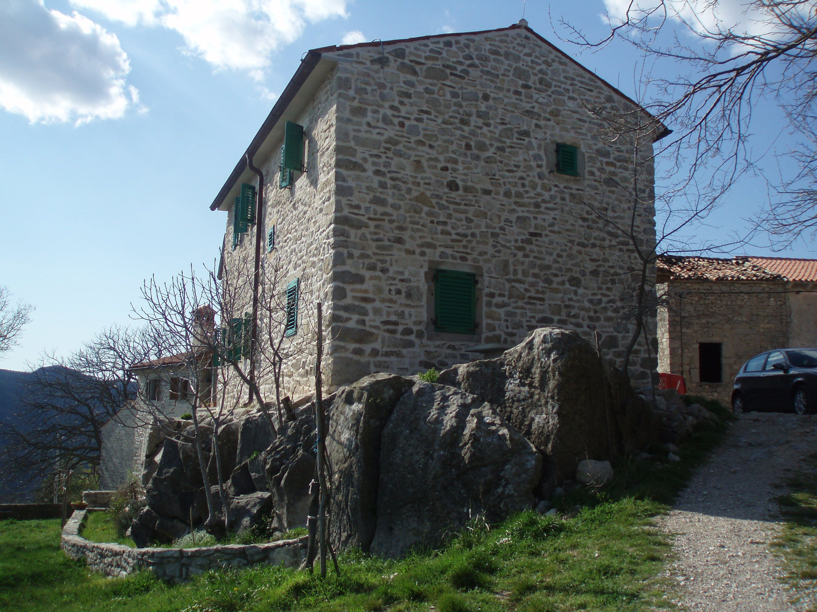 Gradić Boljun, izgrađen je na omanjem brijegu na Boljunskom polju, nedaleko Vranje.